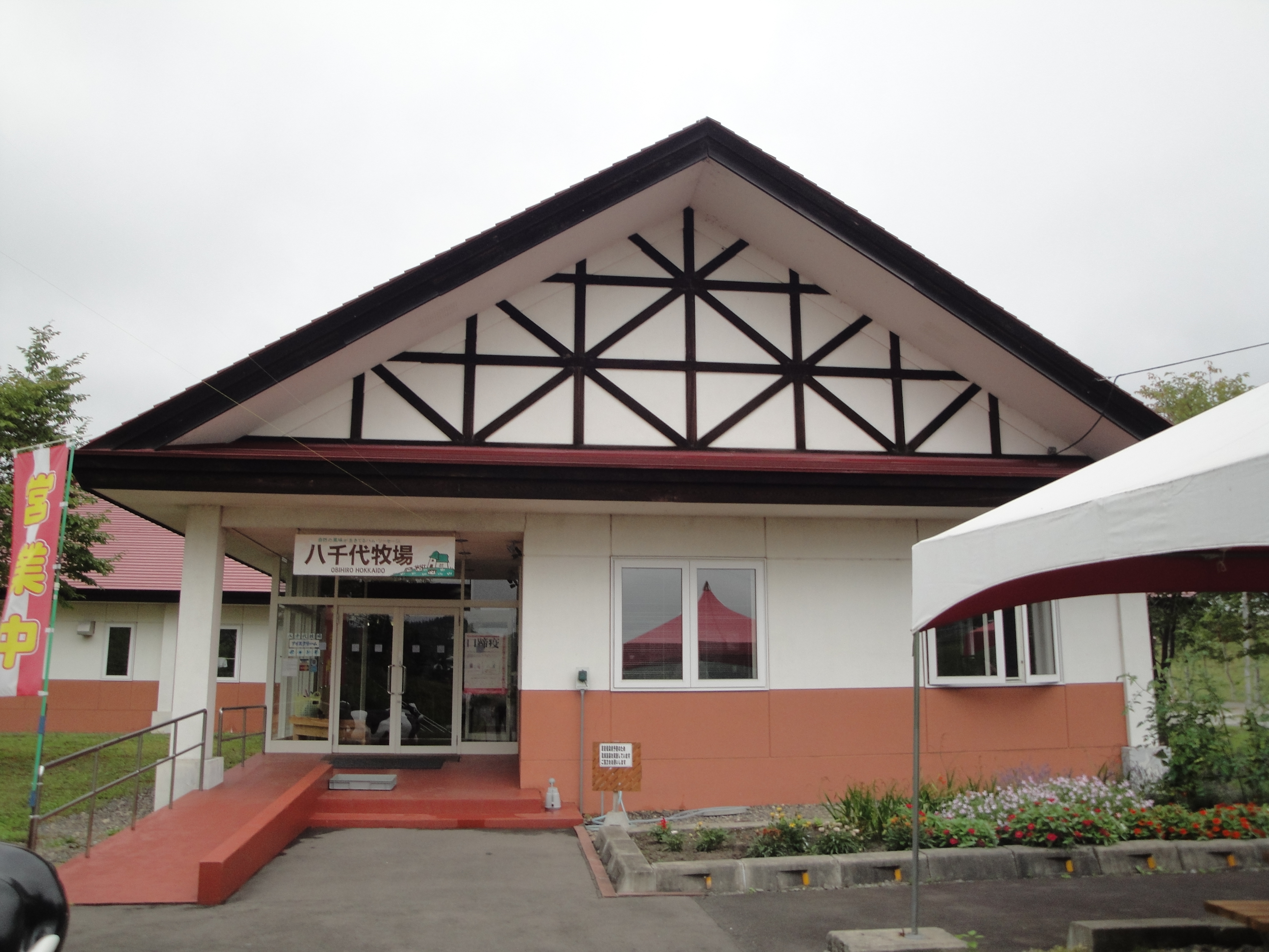 八千代牧場帯広市畜産加工研修センター